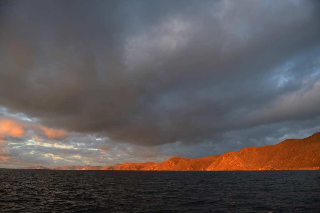 Степная часть острова Ольхон, Прибайкальский национальный парк.